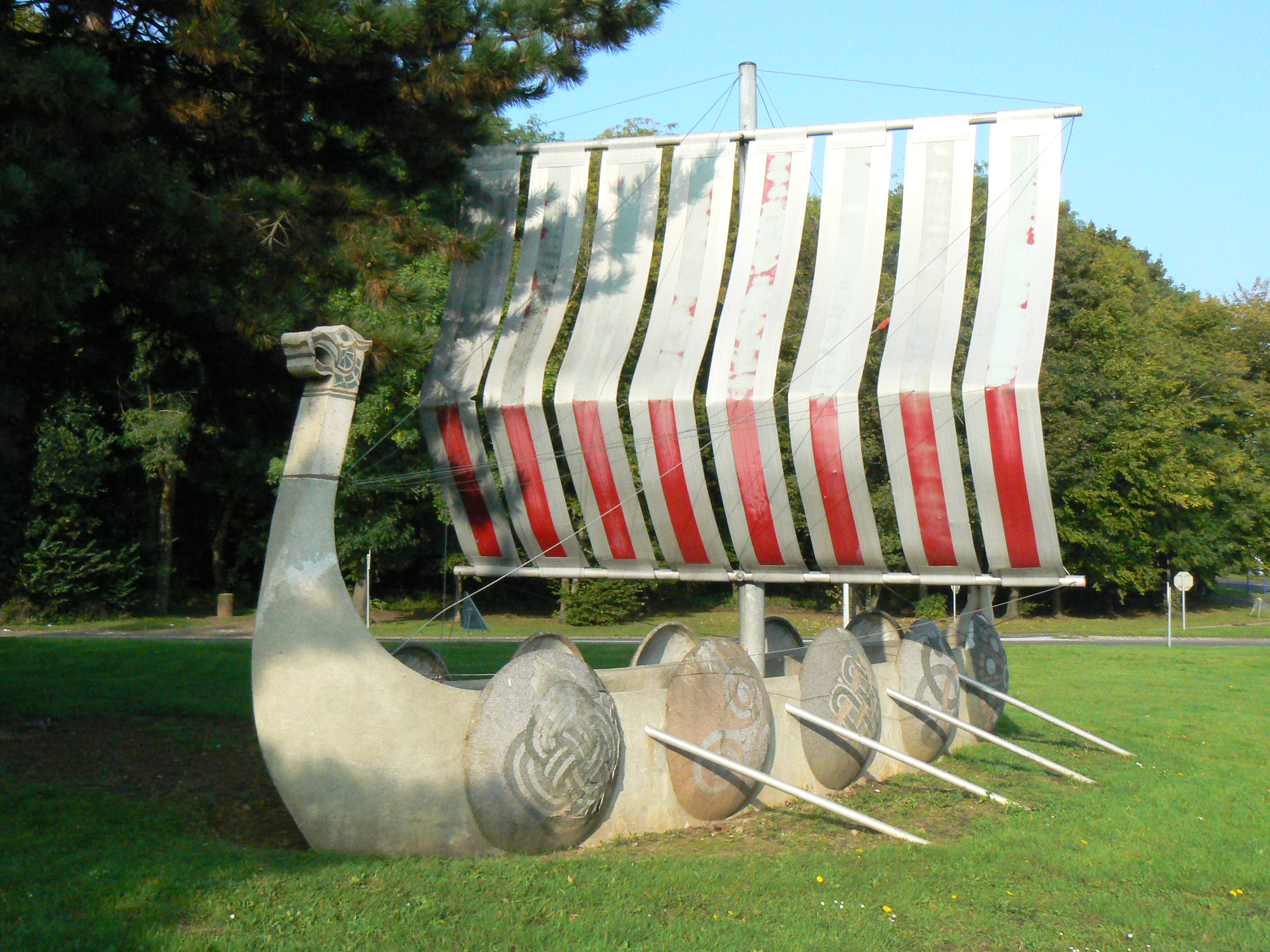 le drakkar, face au quartier du Bois et non loin de la Fonderie, Herouville-St-Clair (14200)